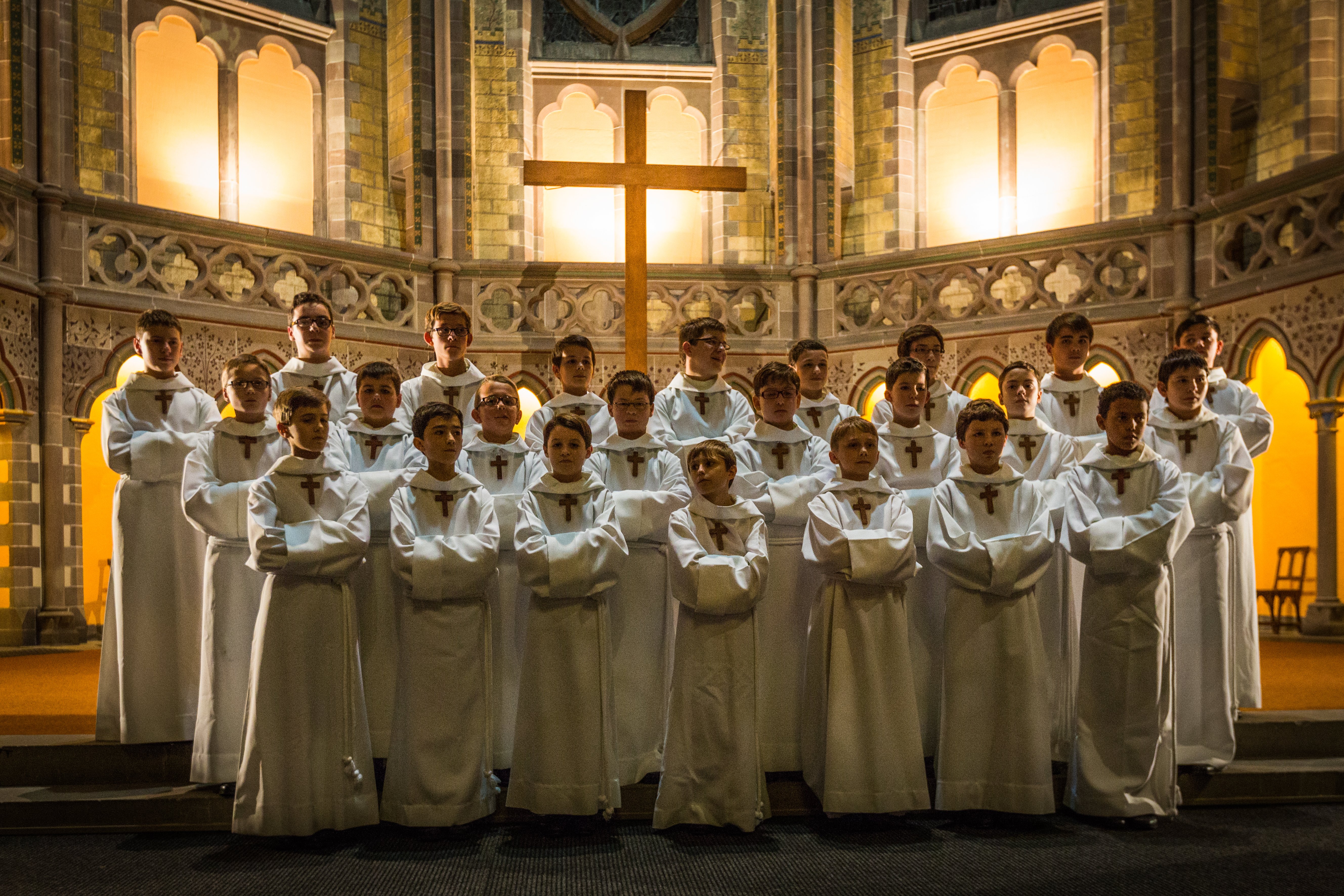 La Manécanterie des Petits Chanteurs à la Croix de Bois en concert à l’église Saint-Paul de Strasbourg pour un concert organisé par la l’Ordre international des Anysetiers, chapitre de Strasbourg, au profit de l’association Semeurs d’Étoiles' le 9 novembre 2013.